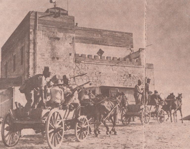 ג'וערה בסיס אימונים של ההגנה 1938 1948 ארכיון ההגנה